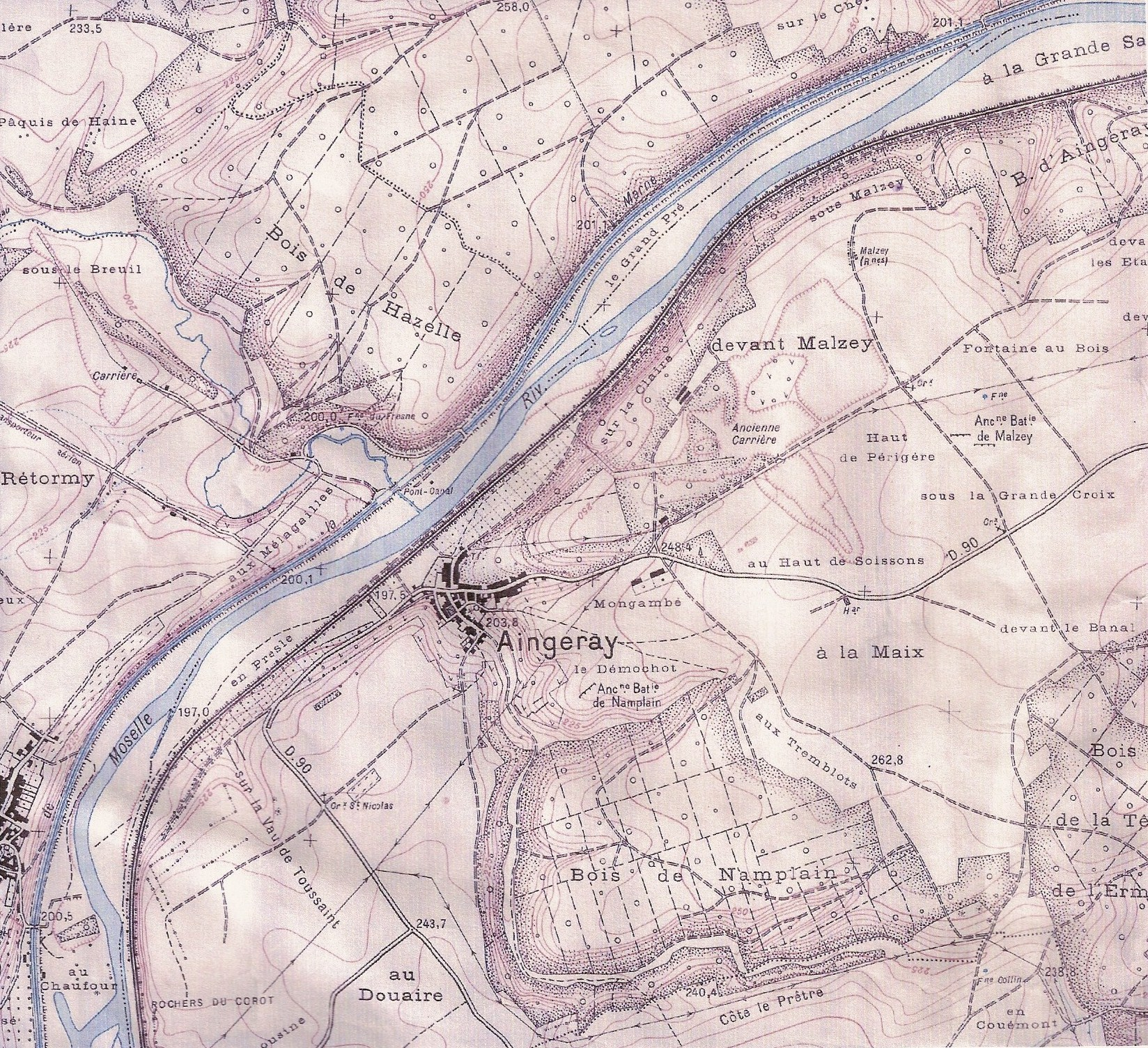 Relevés topographiques d'Aingeray et de Malzey de 1902 revus en 1950